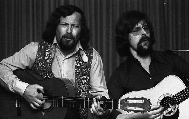 Landesvertretung Berlin in Bonn. Vortragsabend mit "Schobert & Black"